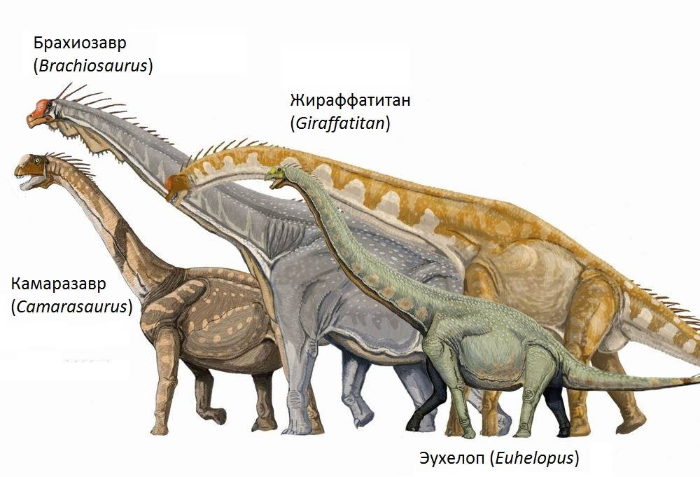 Брахиозавр = Brachiosaurus (en)Жираффатитан = Giraffatitan (en)Κамаразавр = Camarasaurus (en)Эyxeлoп = Euhelopus (en)